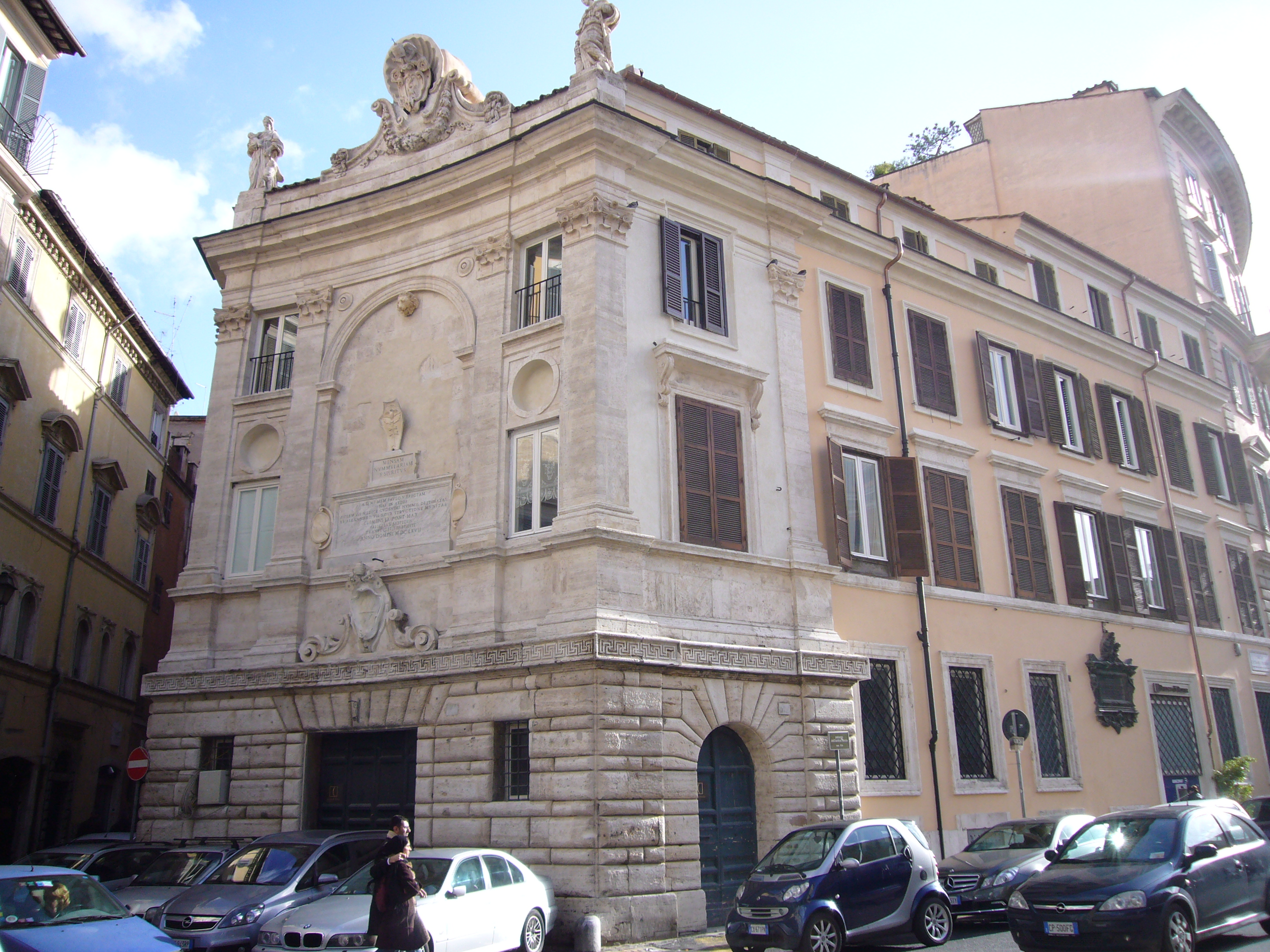 Roma, palazzo della Zecca vecchia ai Banchi nuovi - restaurato